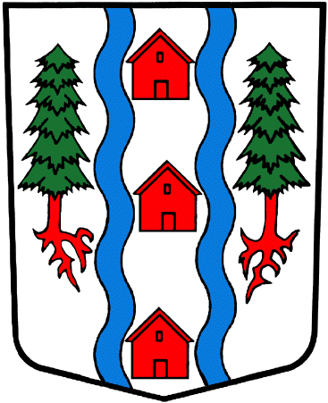 Wappen von Mex Kanton Wallis Schweiz